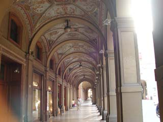 Typische Arkaden in Bologna